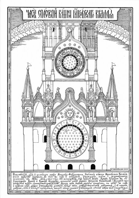 Часы Спасской башни Московского Кремля в XVII веке.